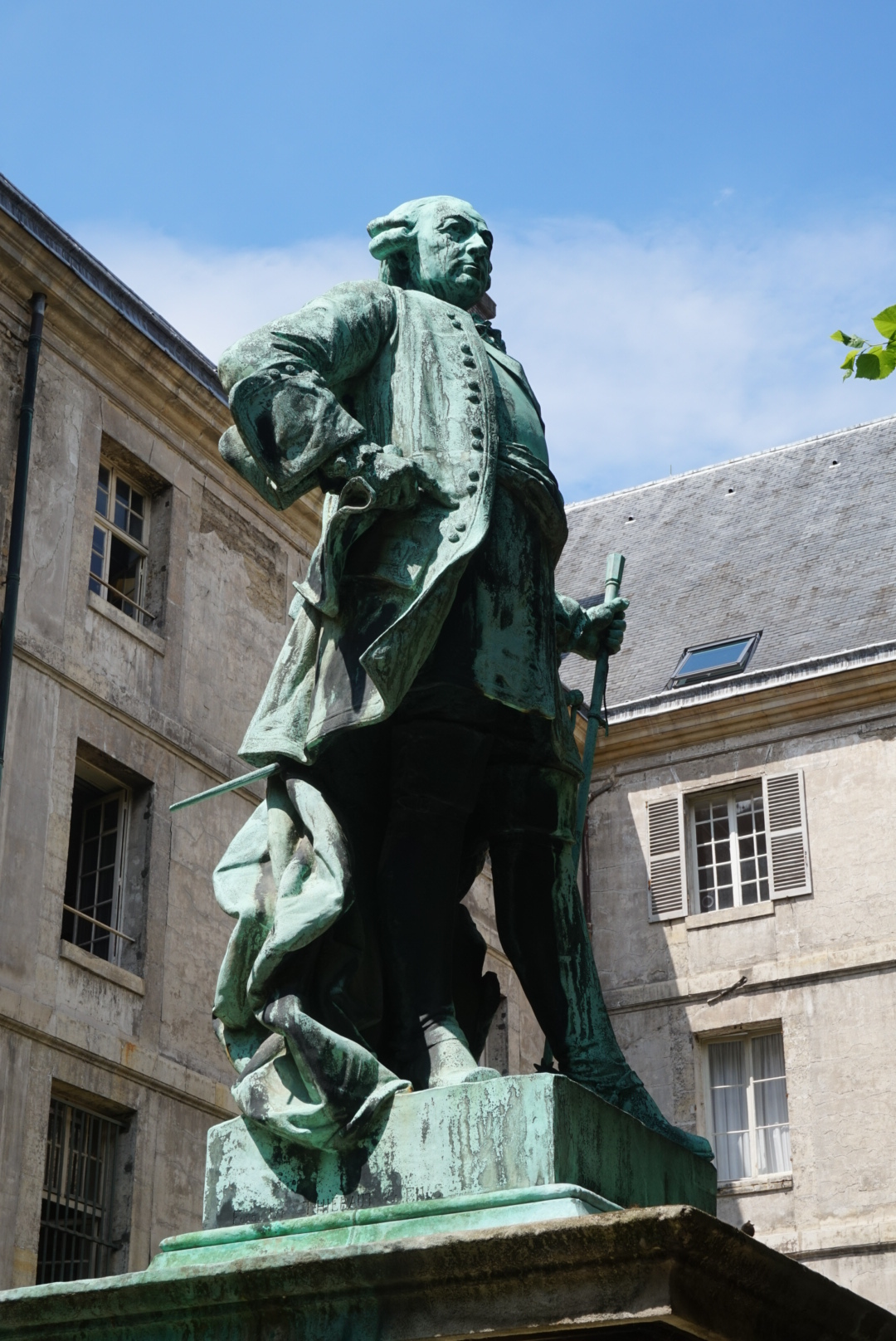 Statue de Gribeauval par Bartholdi, Hôtel national des Invalides, Paris.